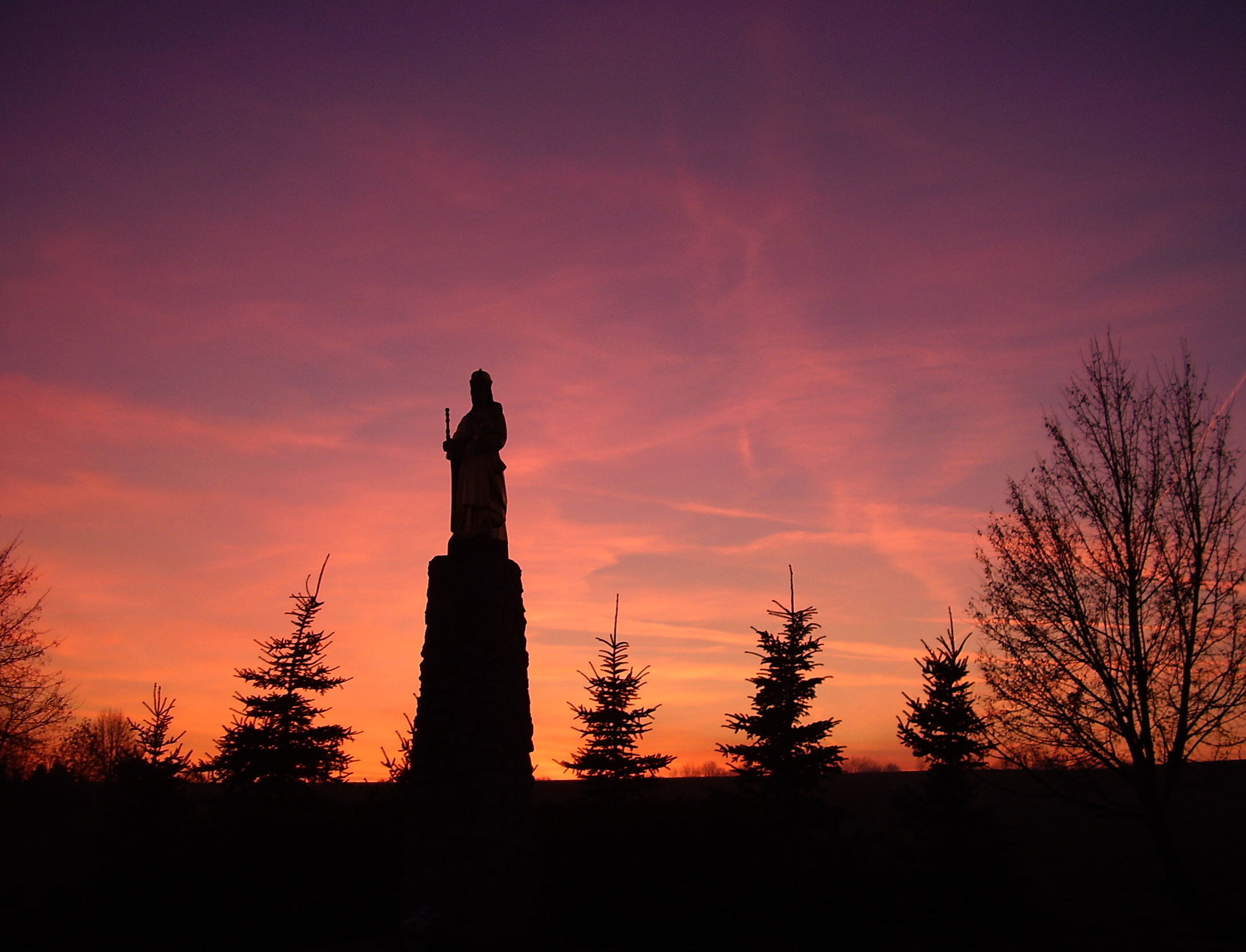 Pútnický areál Studnička.